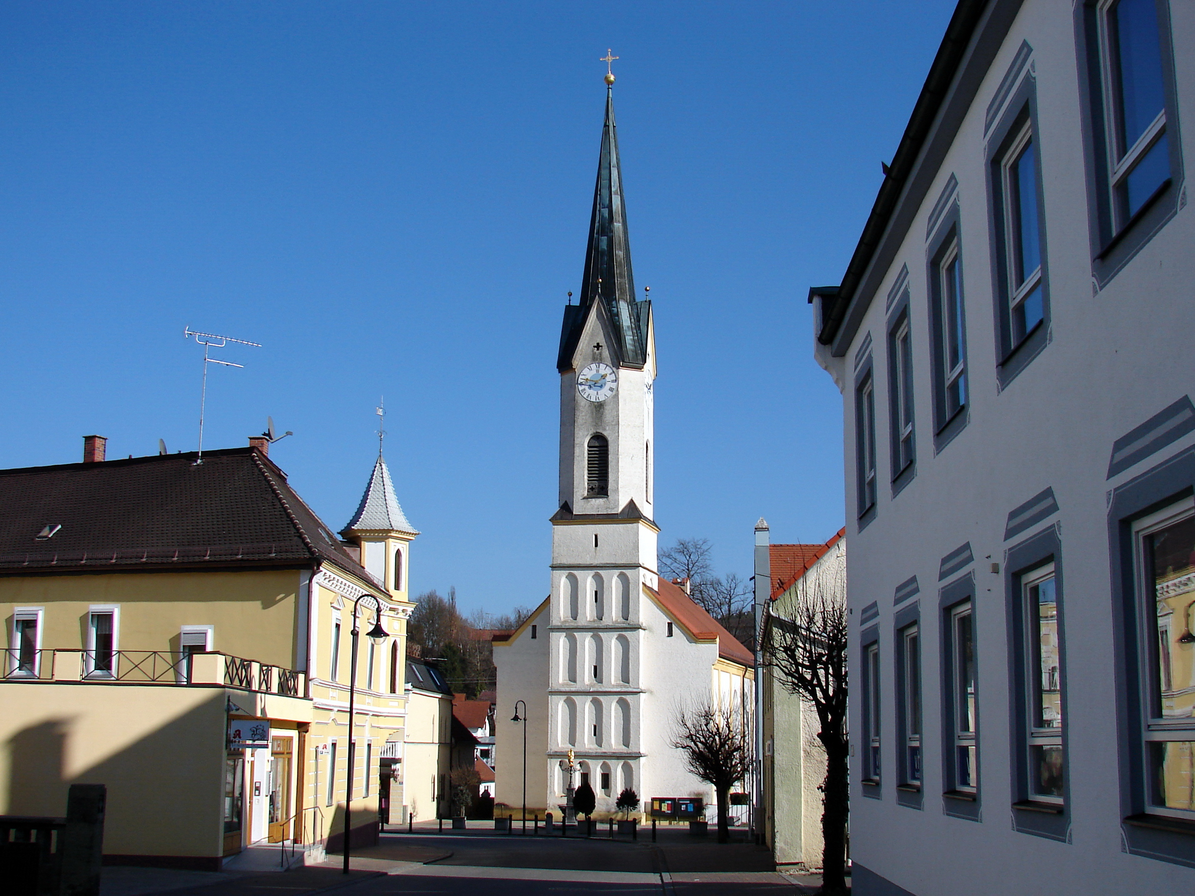 Kirche St. Martin